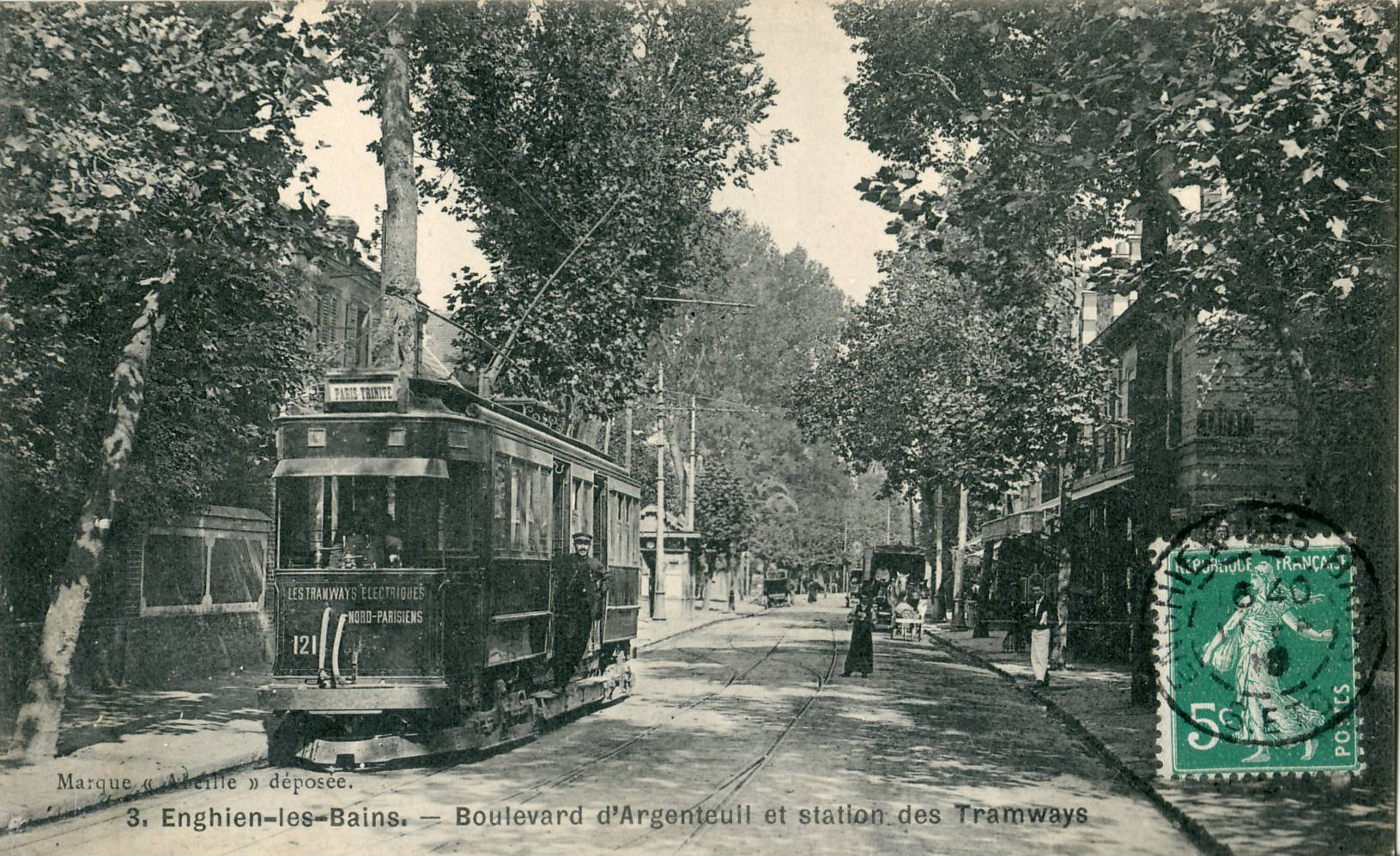 Carte postale ancienne éditée par Abeille N°3ENGHIEN-LES-BAINS : Boulevard d'Argenteuil et station des tramwaysLigne Enghien - Trinité, exploitée à l'époque par la compagnie des tramways électriques Nord parisiens, avant sa reprise par les TPDS